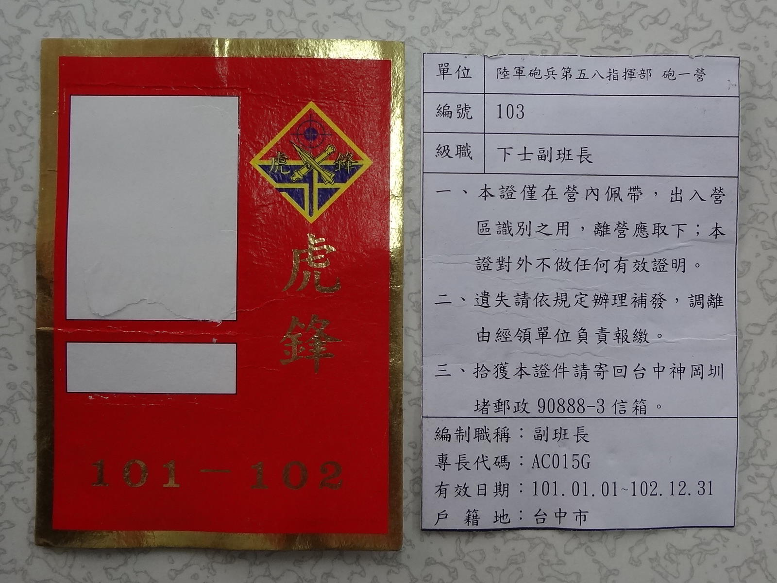 中華民國陸軍砲兵第五八指揮部（虎鋒部隊）2012年至2013年識別證，拍攝時已撕除持證人大頭照與名條。